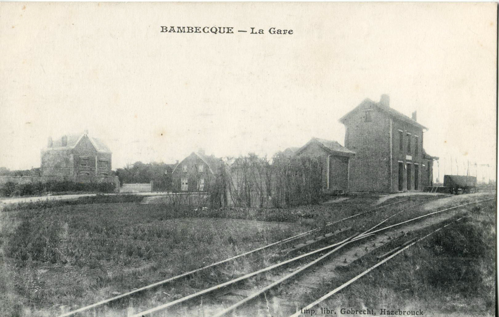 Carte postale ancienne éditée par Gobrecht à Hazebrouck : BAMBECQUE - La Gare